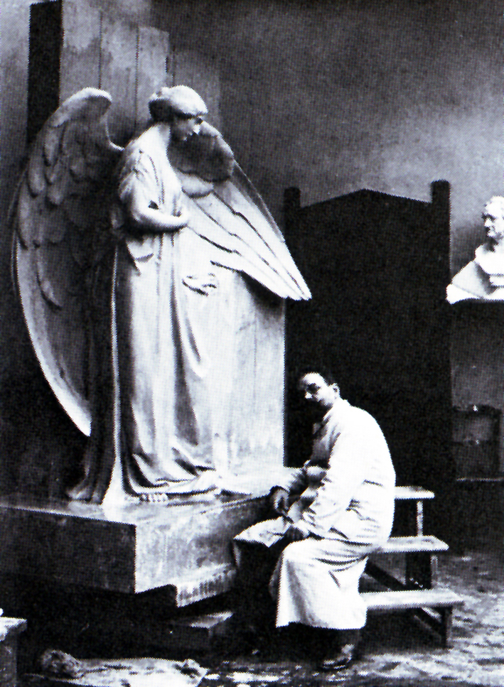 Der Buildhauer Faßbinder bei der Arbeit in seinem Atelier